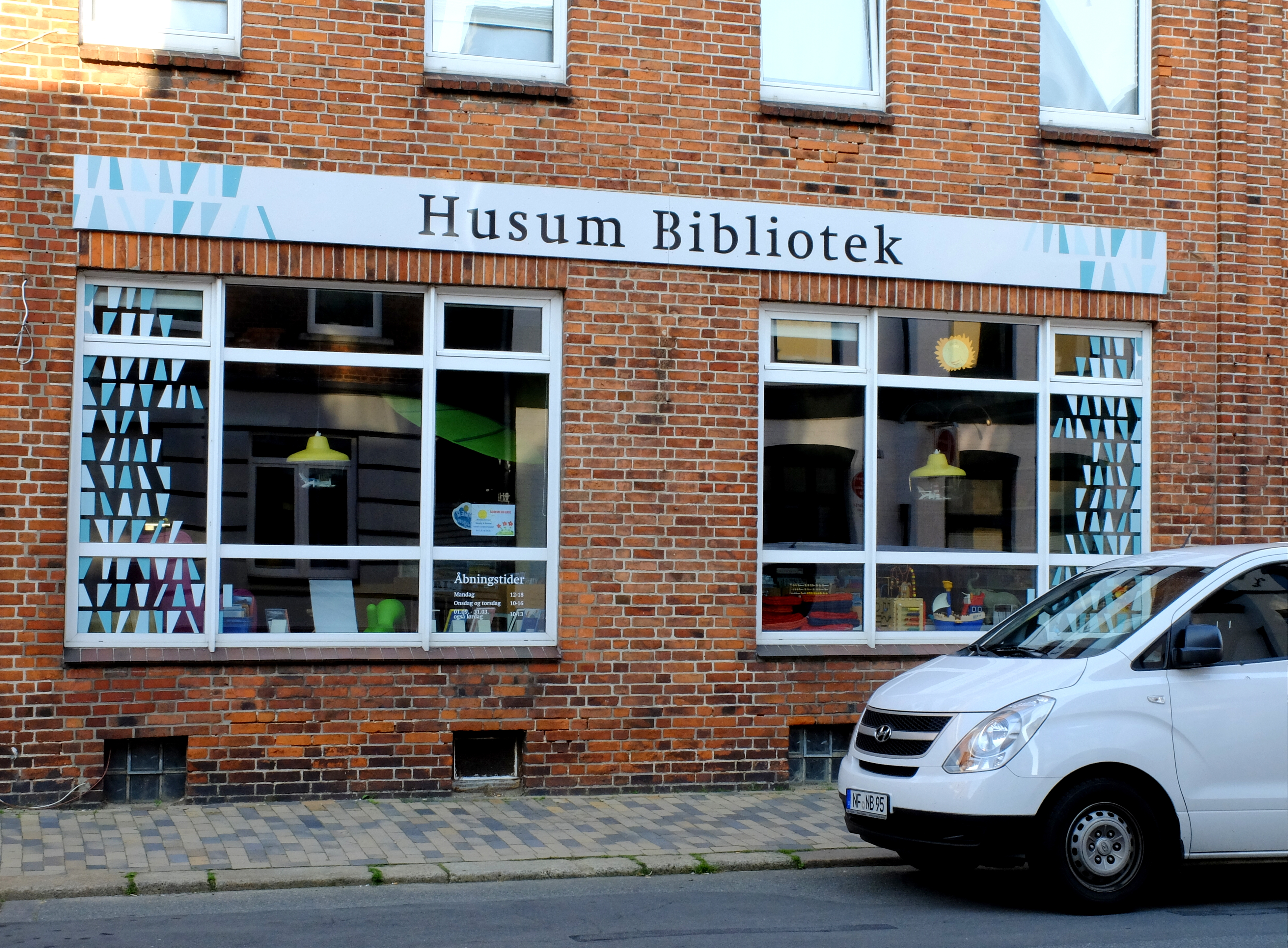 Husum bibliothek am Husumhuus, dänischsprachige Bibliothek in Husum, Schleswig-Holstein.